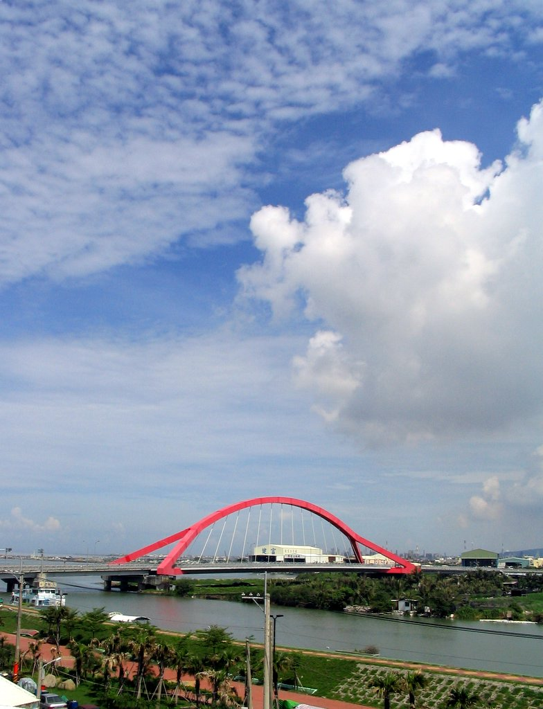 屏東縣東港鎮進德大橋，承載公路為屏63線。